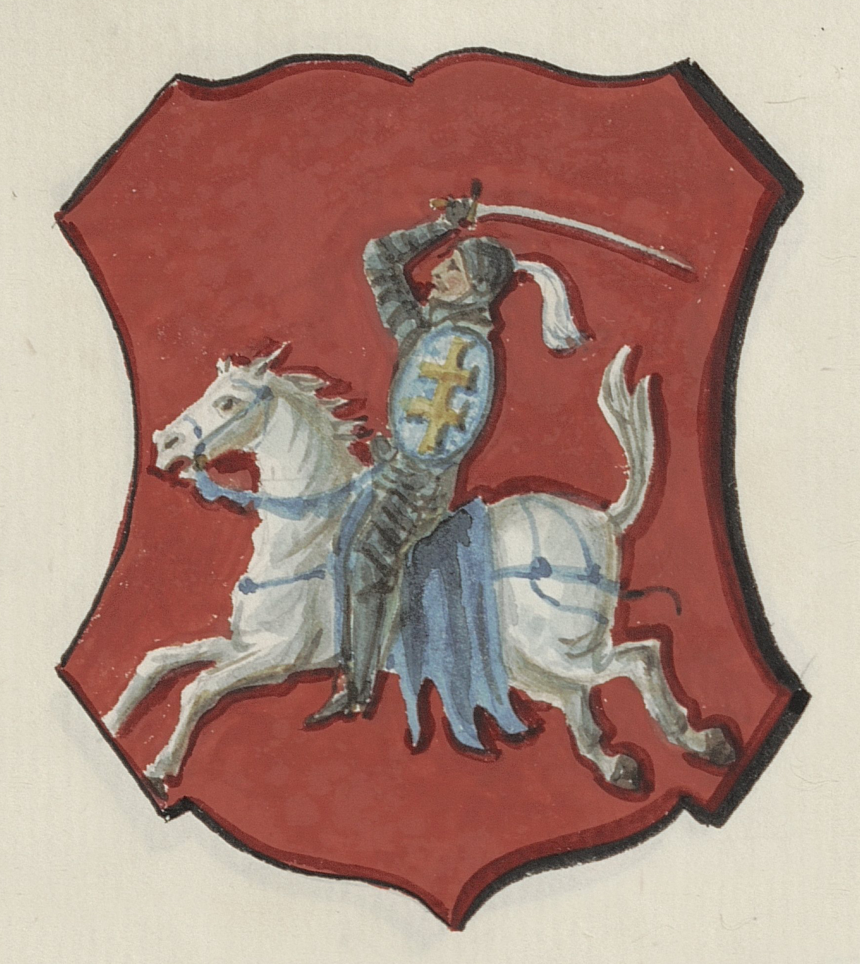 Беларуская (тарашкевіца): Герб Віленскага (Vilnia) ваяводзтва з Пагоняй (Pahonia)